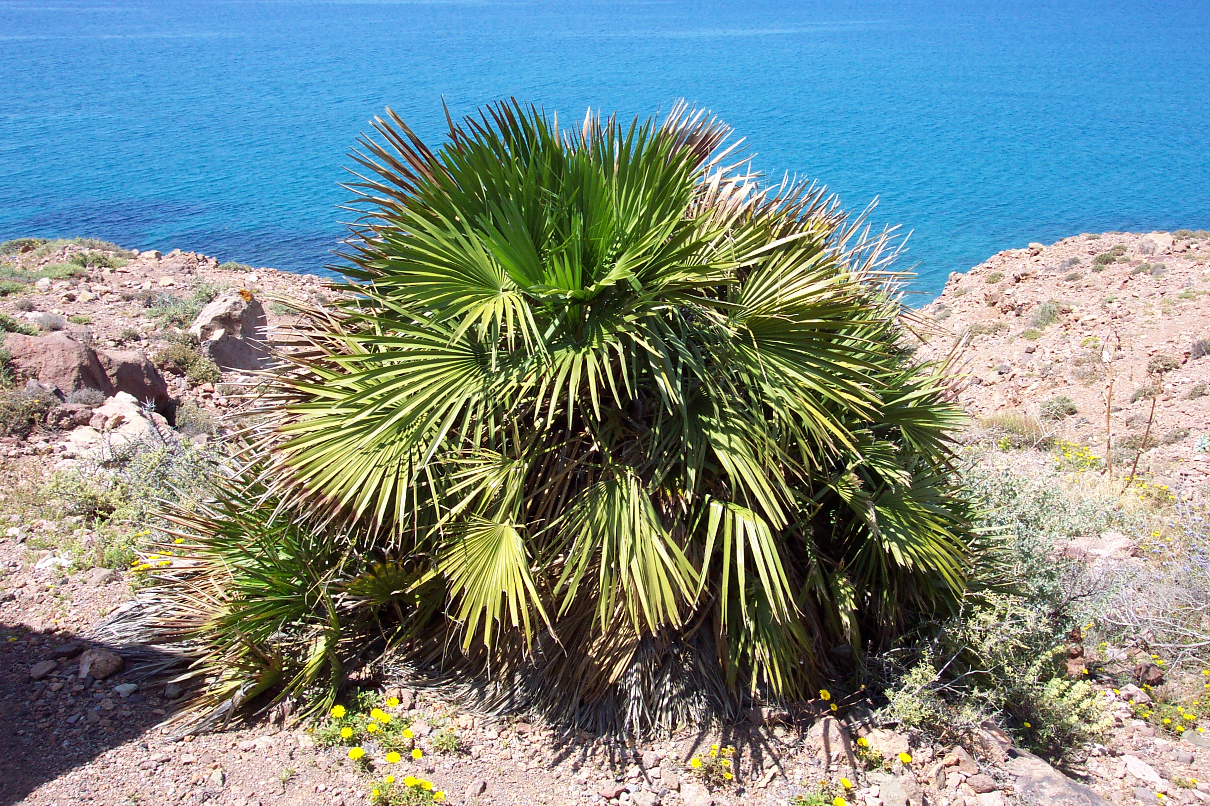 Fotografía de Chamaerops humilis o palmito, planta de la familia de las Arecaceae, tomada en el Cabo de Gata, provincia de Almería, España.